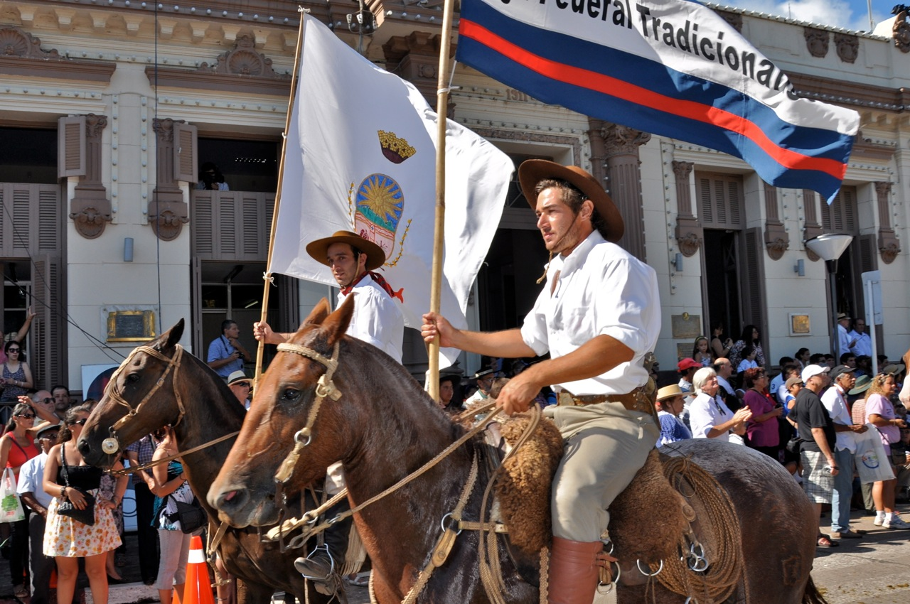 Fiesta de la patria Gaucha en Tacuarembó, Uruguay. Año 2013.